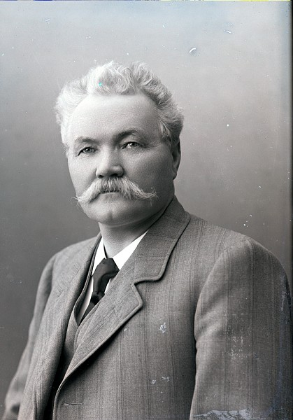 Hans Hanssen (1853–1923), stortingsmann for kjøpstedene Trondhjem og Levanger (Frisinnede Venstre) 1910–1912.